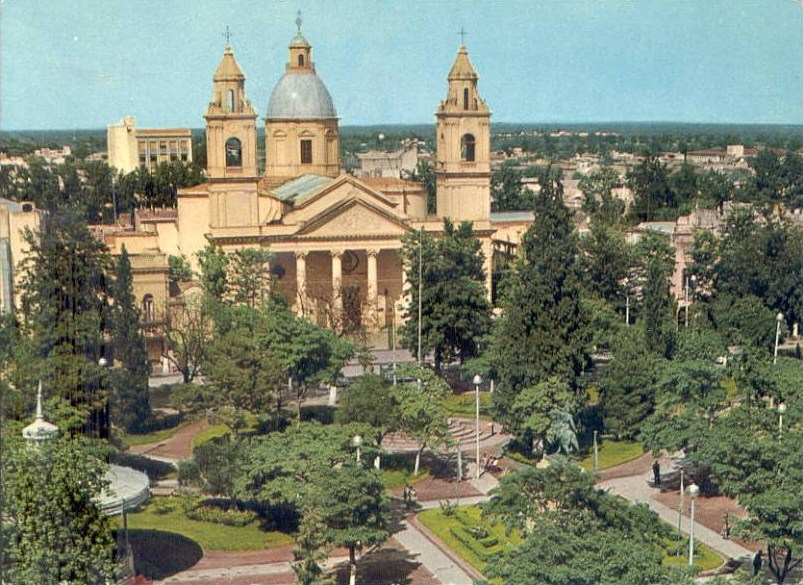 Catedral de Santiago del Estero.